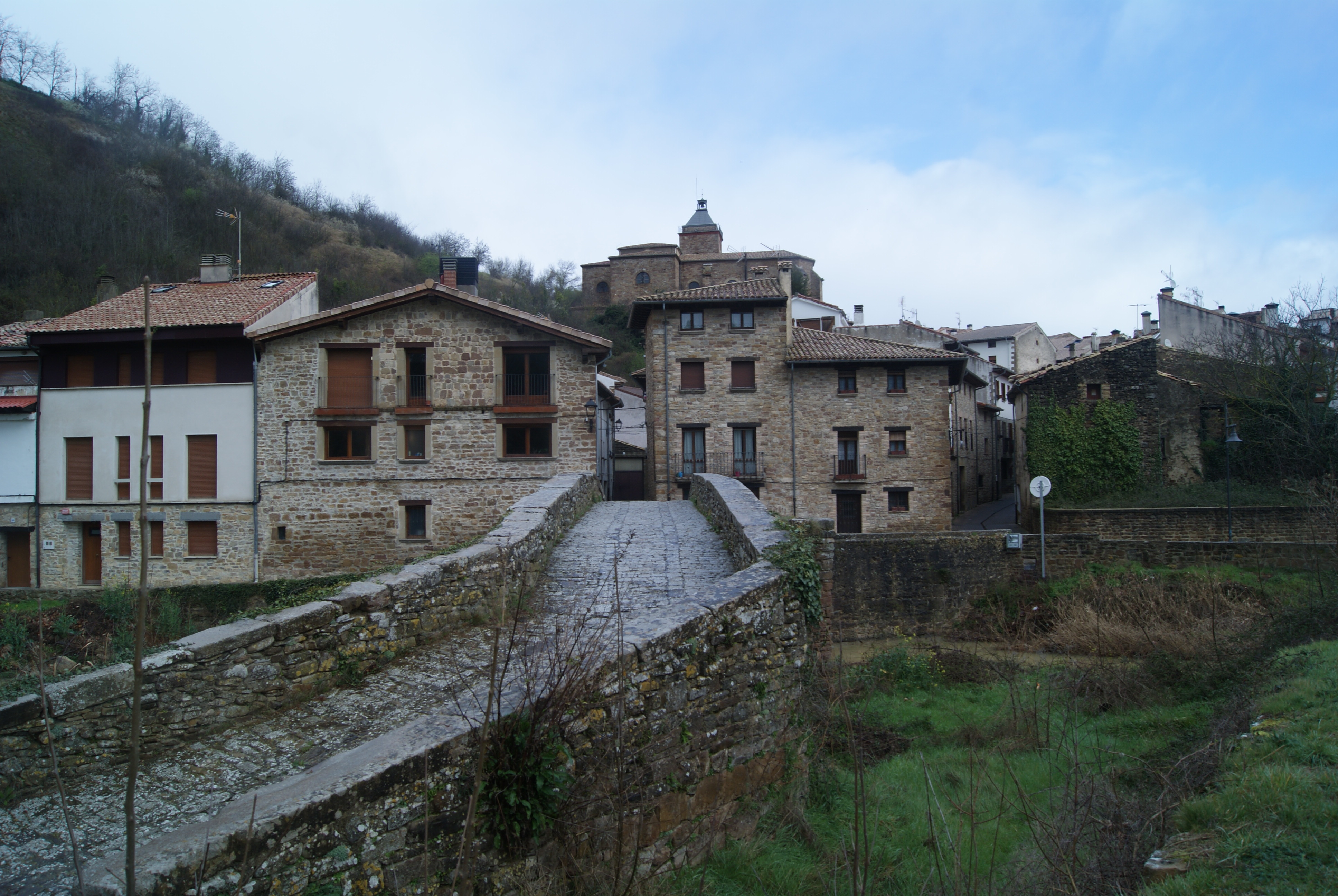 Vista de Monreal (Navarra)